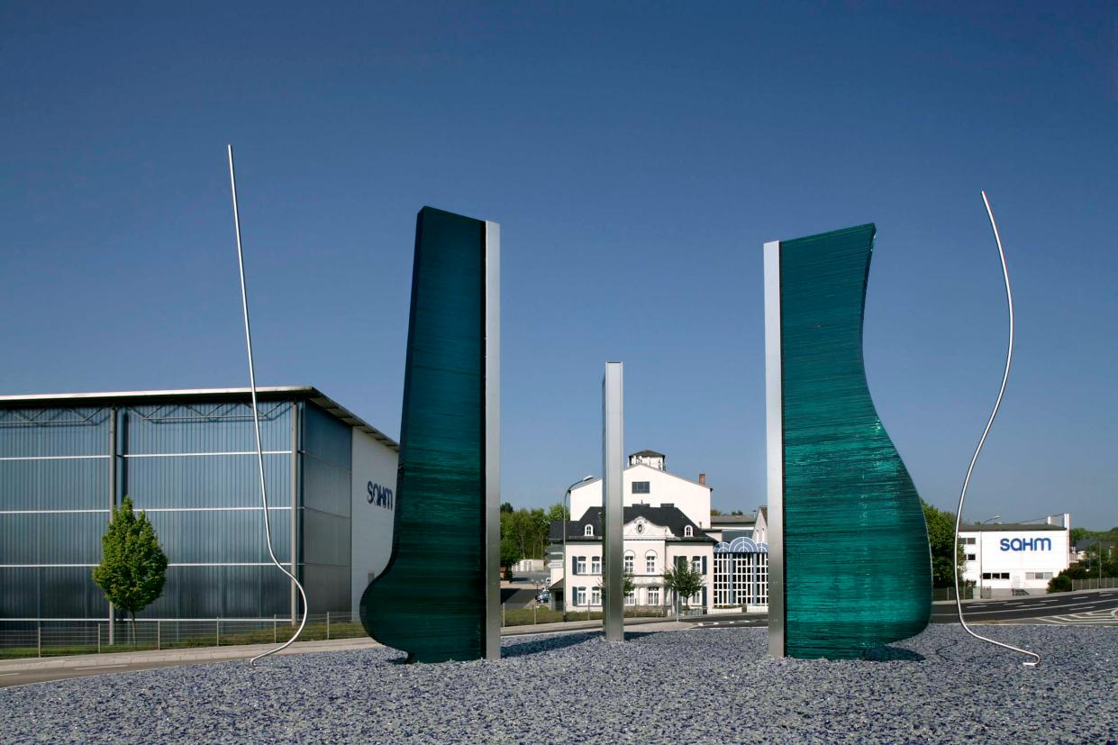 Sahm Glassskulpturen